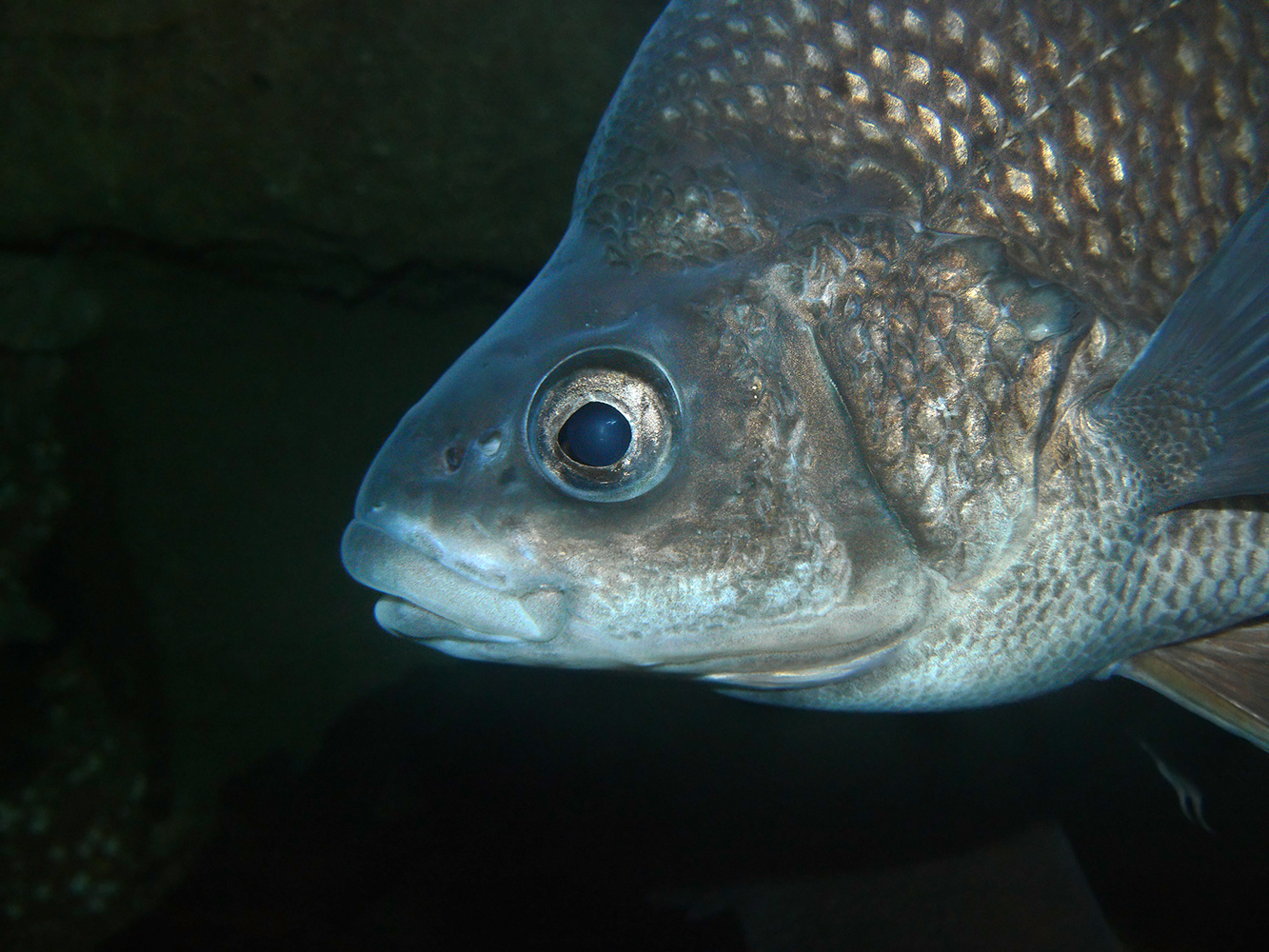 Macquarie_perch (Macquaria australasica)